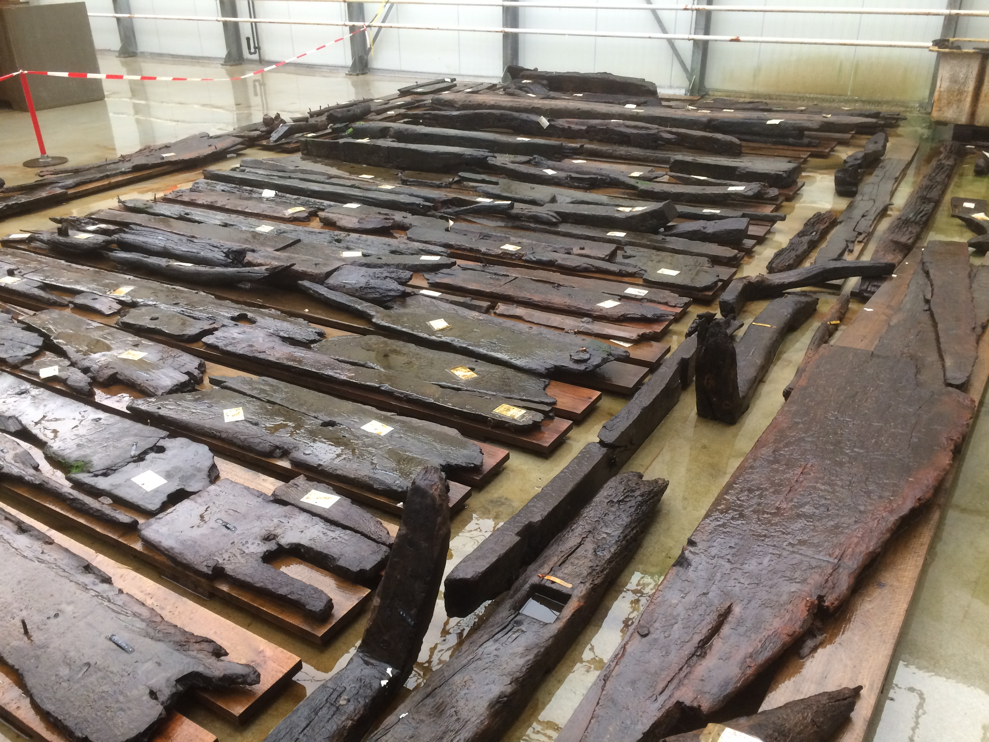 Losse houten delen van de IJsselkogge, Aak en Punter